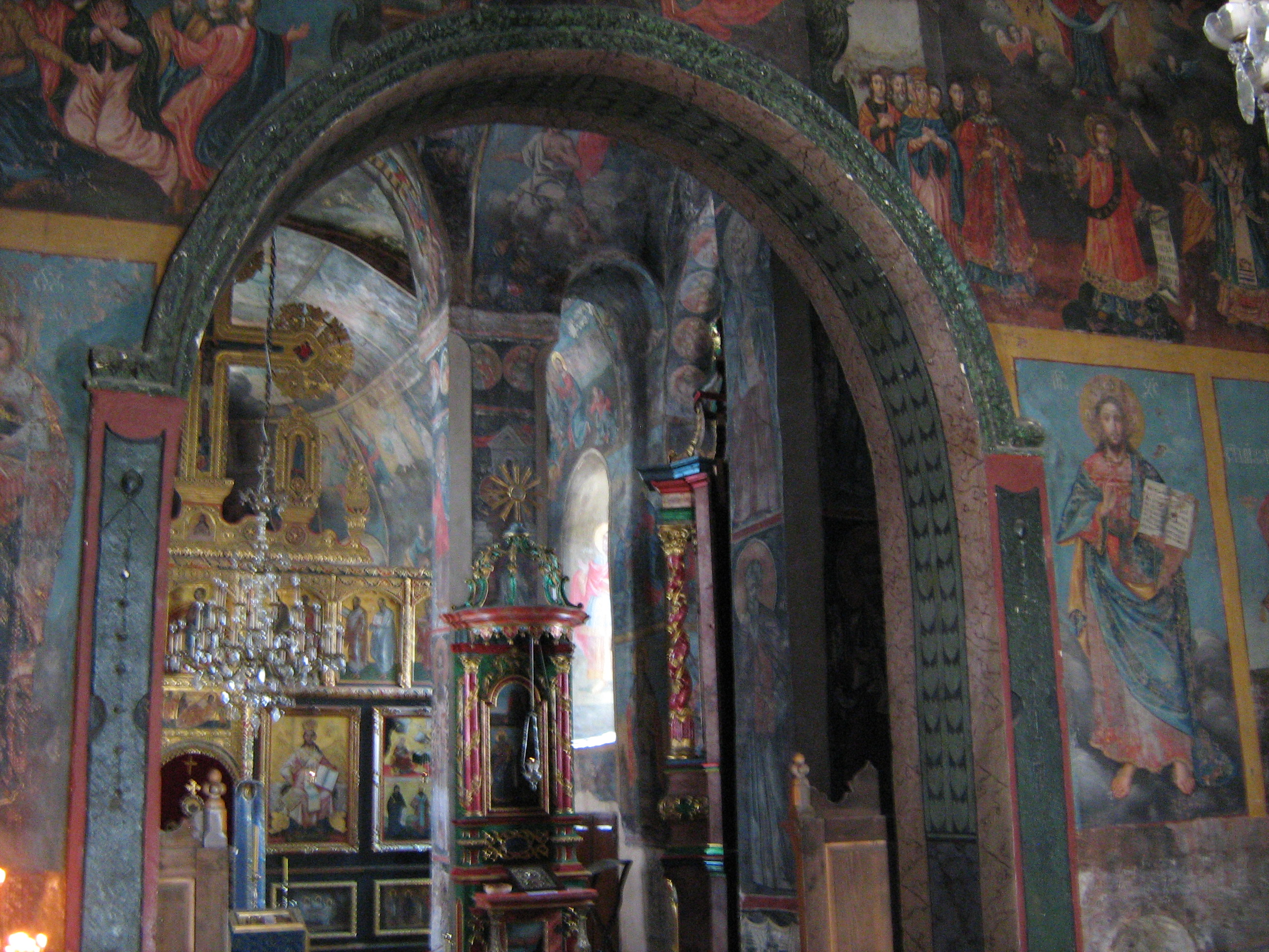 Унутрашњост цркве